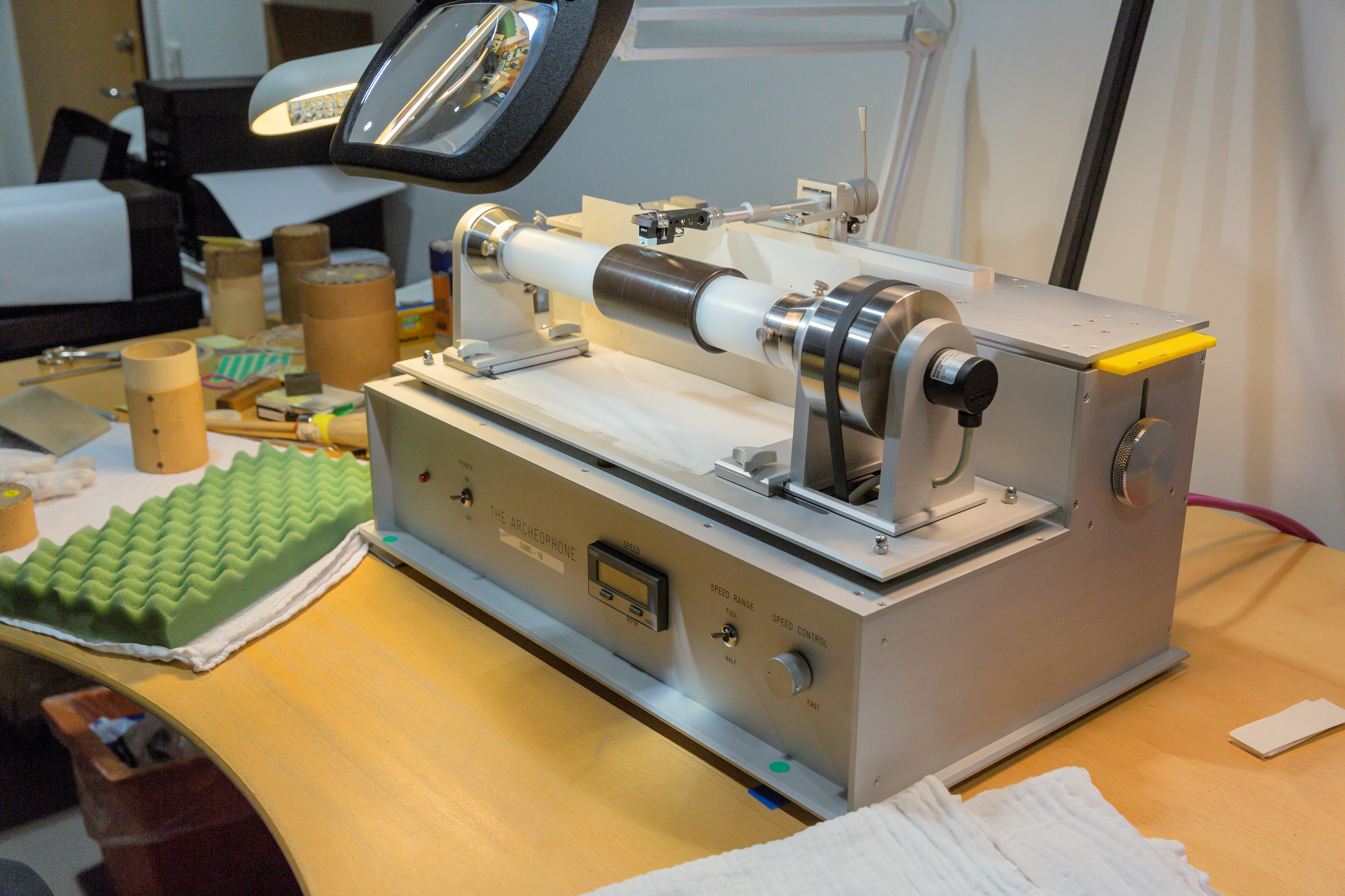 Archeophonen